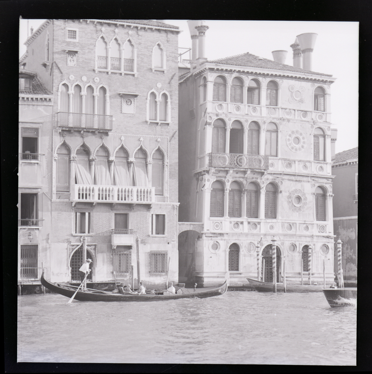 Servizio fotografico : Venezia, 1969 / Paolo Monti. - Buste: 1, Fototipi: 8 : Negativo b/n, gelatina bromuro d'argento/ pellicola ; 6x6. - ((Serie costituita da 1 contenitore portanegativi con 5 strisce di negativi identificabili con i nn.: 19521, 19522, 19523, 19524, 19525, 19526, 19527, 19528 (non è però possibile identificarli singolarmente non essendoci scritti i numeri in corrispondenza del singolo negativo). - Sul portanegativi: iscrizioni didascaliche e inventariali. - Occasione: Documentazione per la pubblicazione: Arslan Edoardo, "Venezia gotica: architettura civile gotica veneziana", Milano, Electa, 1970. - Fonte: Monografia di Arslan, Edoardo: Venezia gotica: architettura civile gotica veneziana, Milano, Electa (1970)